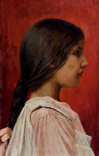 Osman Hamdi Bey tarafından yapılmış kızı Nazlı'ya ait olduğu düşünülen portre, 1905